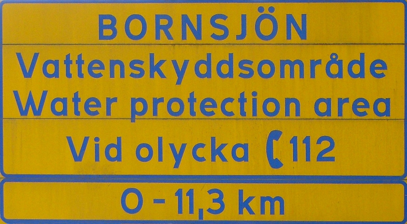 Sign "Water protection Area", Bornsjön, Sockholms län